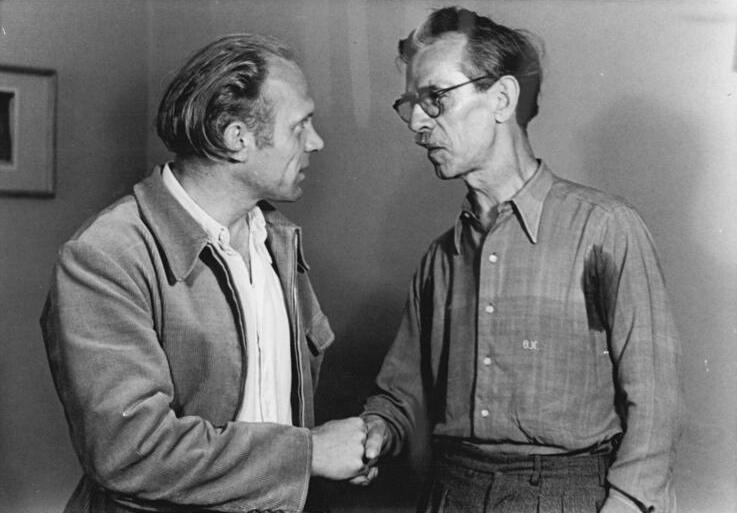 VBK-Gründung, Arno Mohr, Otto Nagel Gründung des Verbandes bildender Künstler Am 17. und 18.6.50 wurde auf einem vom Kulturbund eingerufenen Kongreß der Verband bildender Künstler gegründet. UBz: Professor Arno Mohr (links) begrüßt Professor Nagel Aufn. Illus Rudolph 6871-50 2) Mlk 17.6.50 Abgebildete Personen: Nagel, Otto Prof.: Maler, Präsident der Akademie der Künste (AdK), Nationalpreisträger, Vaterländischer Verdienstorden (VVO) in Gold, DDR (GND 118586300)